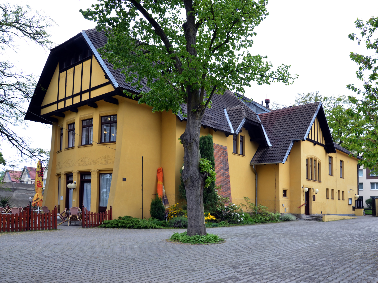 Kotěrova vila, Libušina 188, Bechyně